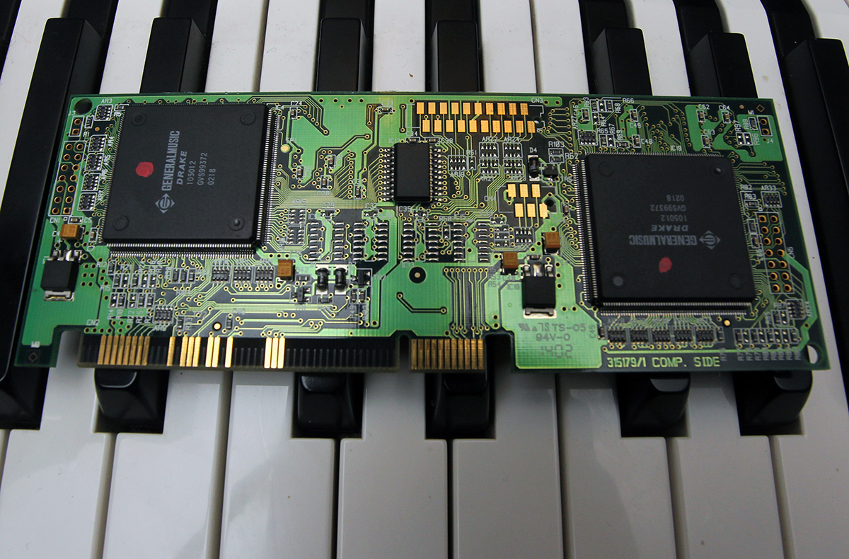 Generalmusic DRAKE Gino Allegritti licenza d'uso CC-BY-4.0